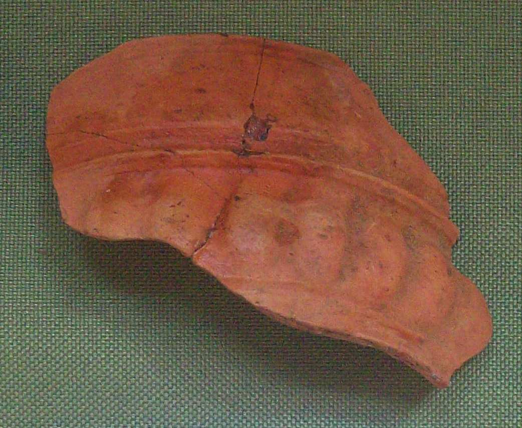 Cerámica búcaro hallada entre los restos del barco mercante hundido en la costa de Buenos Aires (Pescio ZenCity)